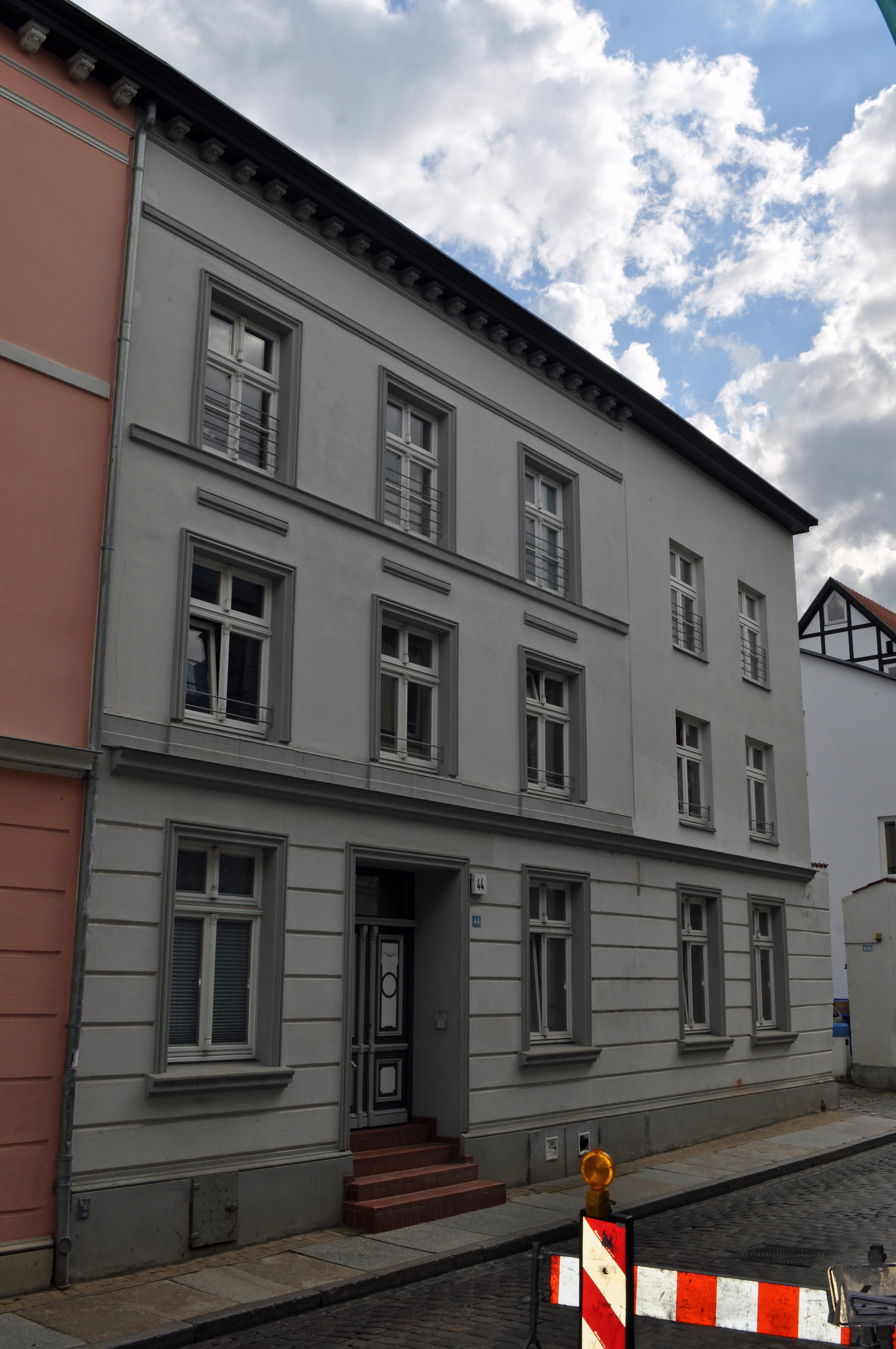 Das Foto zeigt ein Haus (bzw. Details des Hauses) in der Frankenstraße in Stralsund, Deutschland. Die Hausnummer steht im Dateinamen. Aufgenommen am 19. Juli 2011 vom Benutzer:Klugschnacker.